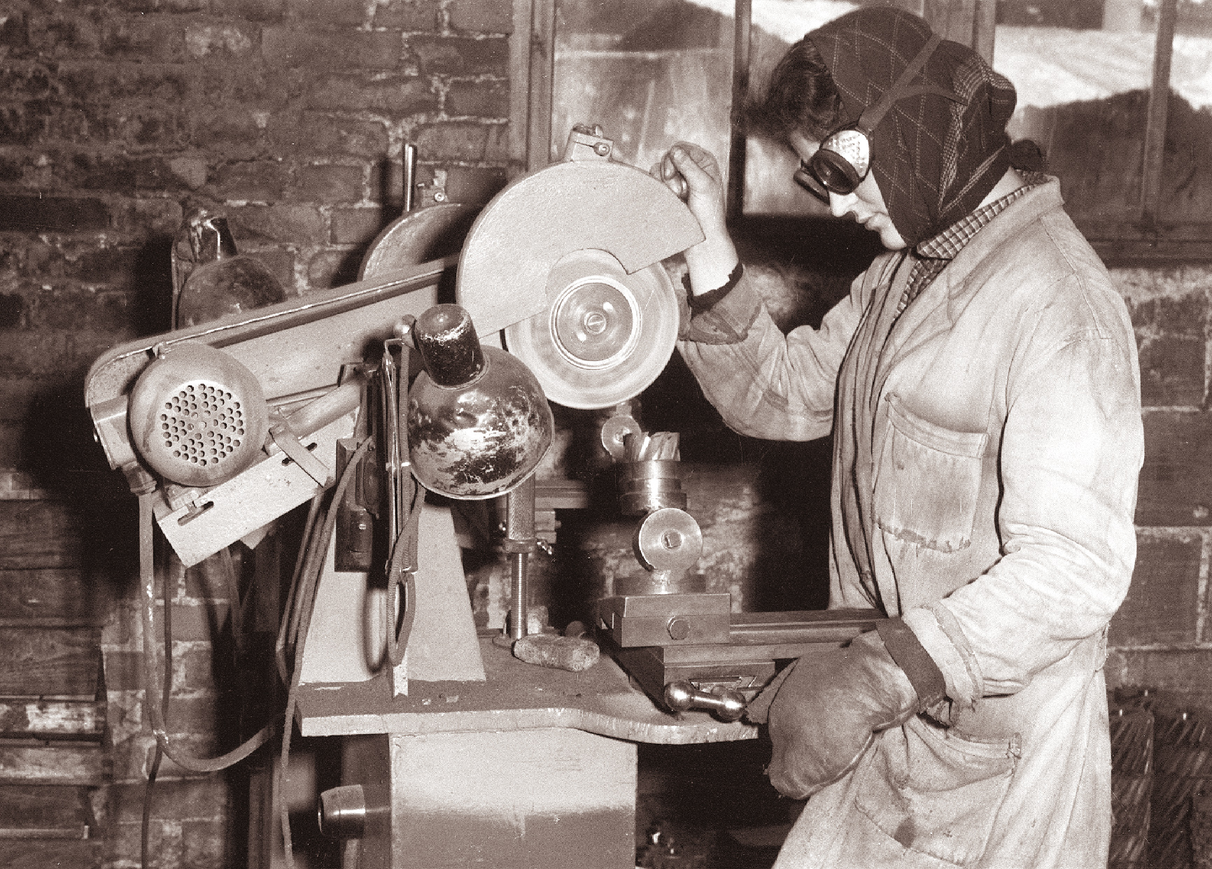 Tovarna rezalnega orodja v Prevaljah - doma izdelan brusilni stroj